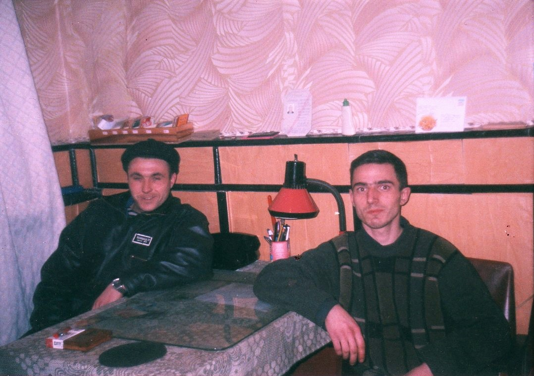 Зеки.